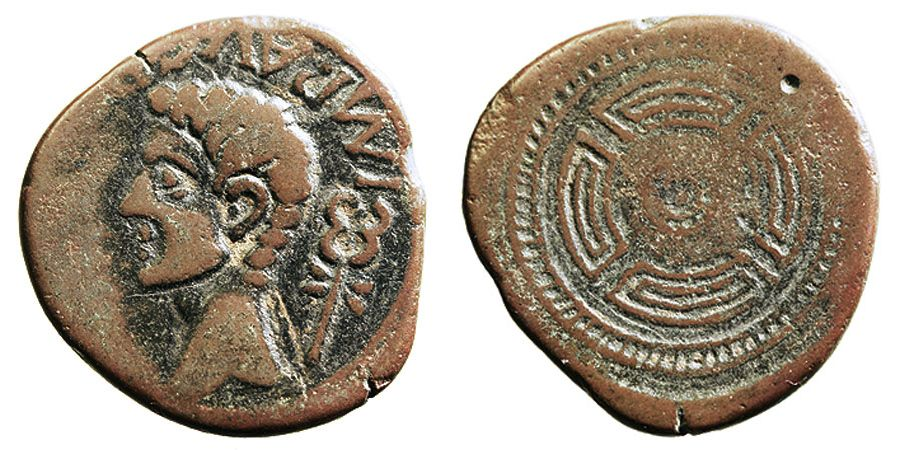 As emitido en Lucus Augusti (Lugo). En bronce.